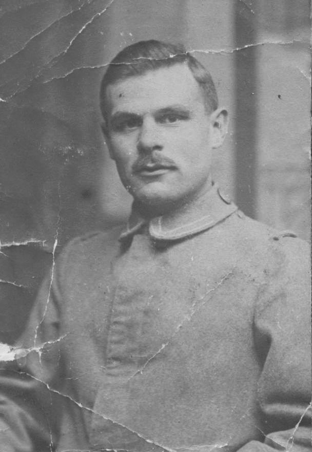 Friedrich Bengel, Dirmstein, Inhaber der Bayerischen Tapferkeitsmedaille